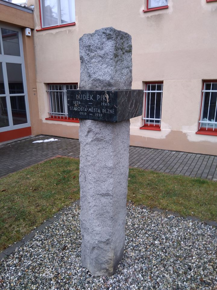 Kámen s pamětní deskou Luďka Pika před budovou Gymnázia Luďka Pika v Plzni.